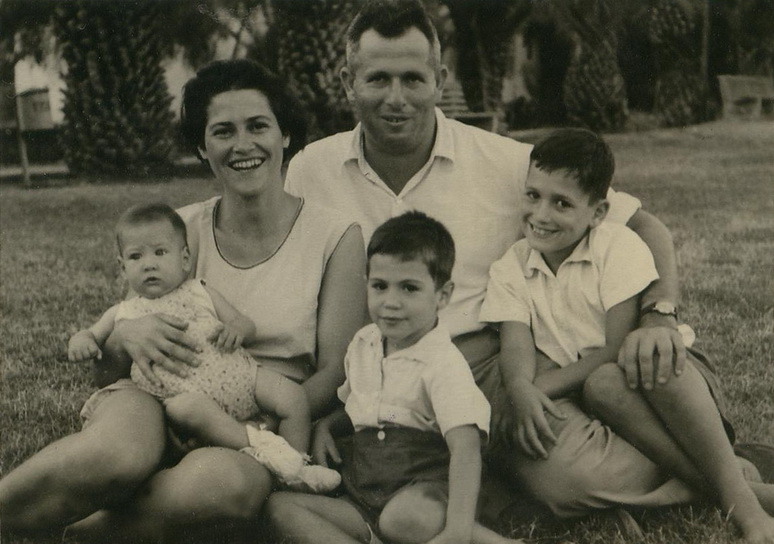 אסף שמחוני, אשתו דלילה ושלשת ילדיהם. מימין לשמאל: יואב, אבנר ויפתח תל יוסף 1952